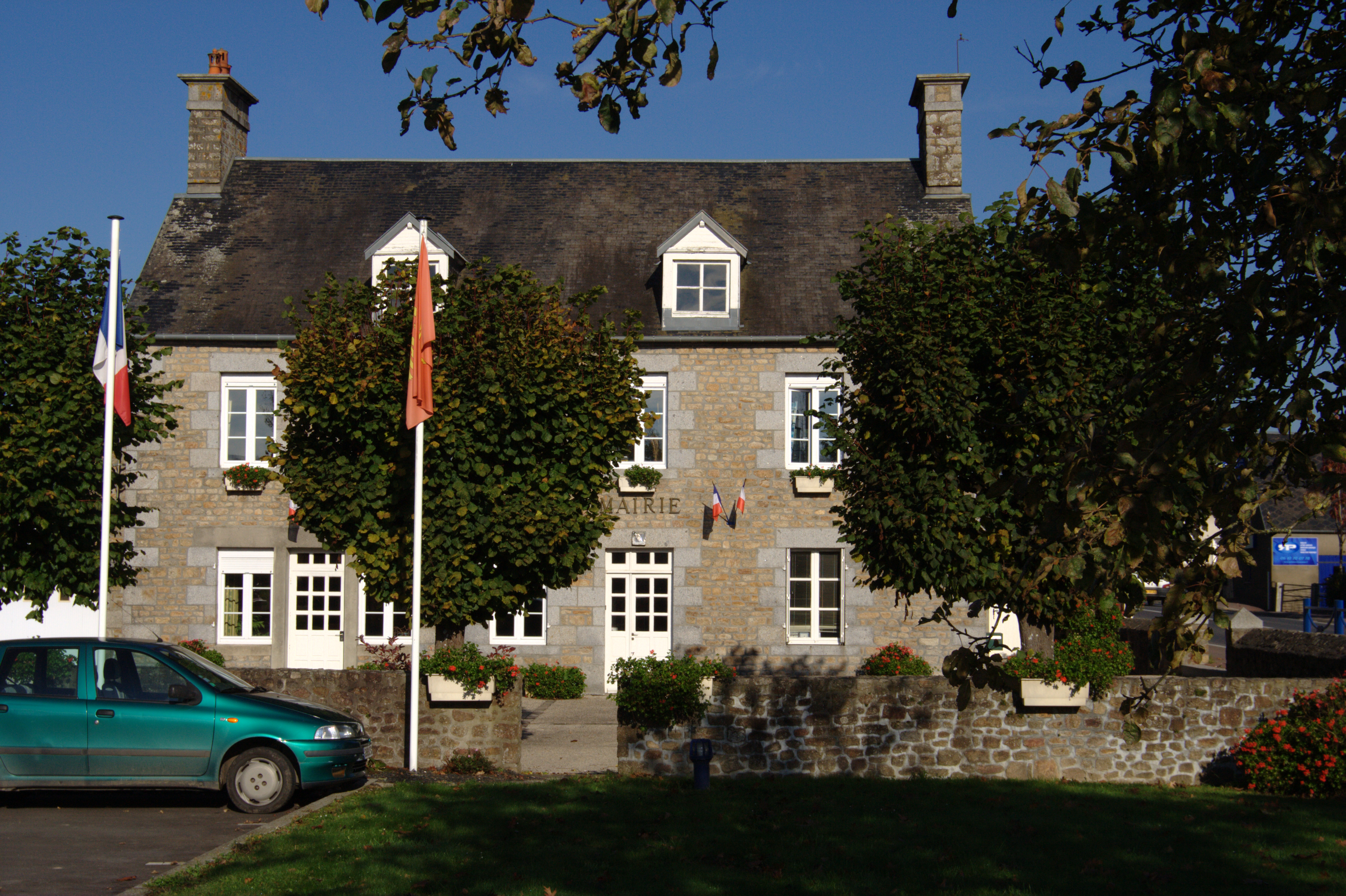 Mairie de Ponts